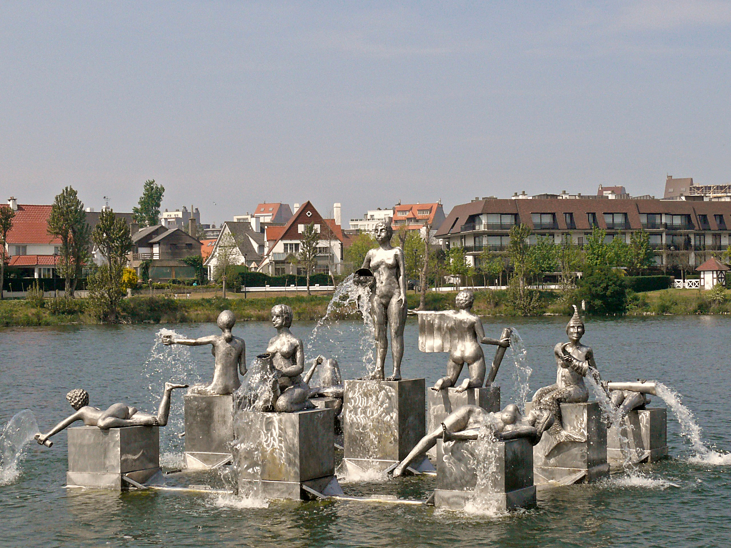 Drijvende beeldengroep in roestvrij staal, n.o.v. beeldhouwer J. Claerhout. In 1990 in het meer geplaatst. Heeft nu plaats gemaakt voor Wuivende Krabben van Panamarenko.